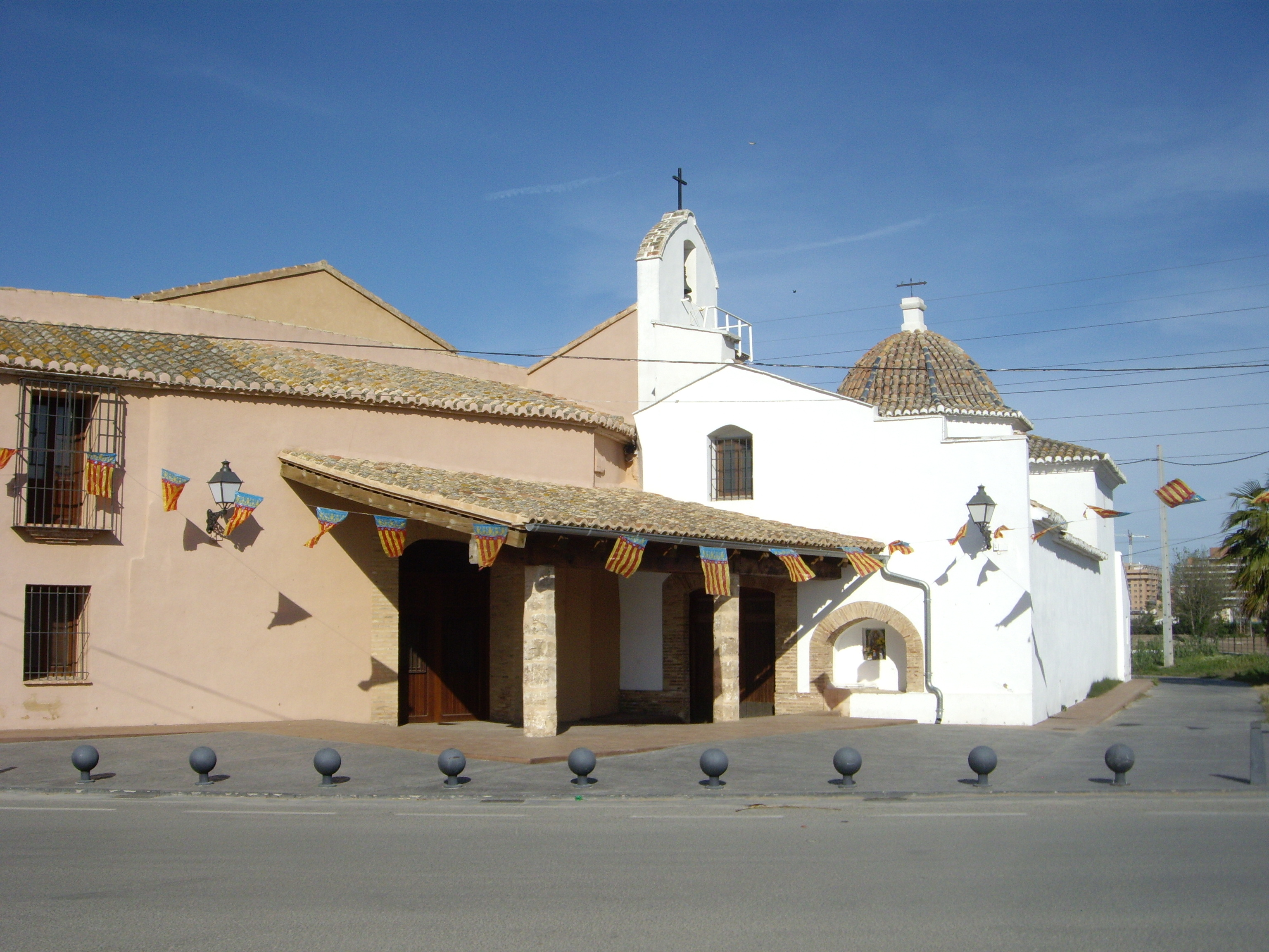 Ermita de Vera, a l'horta de Benimaclet, País Valencià.